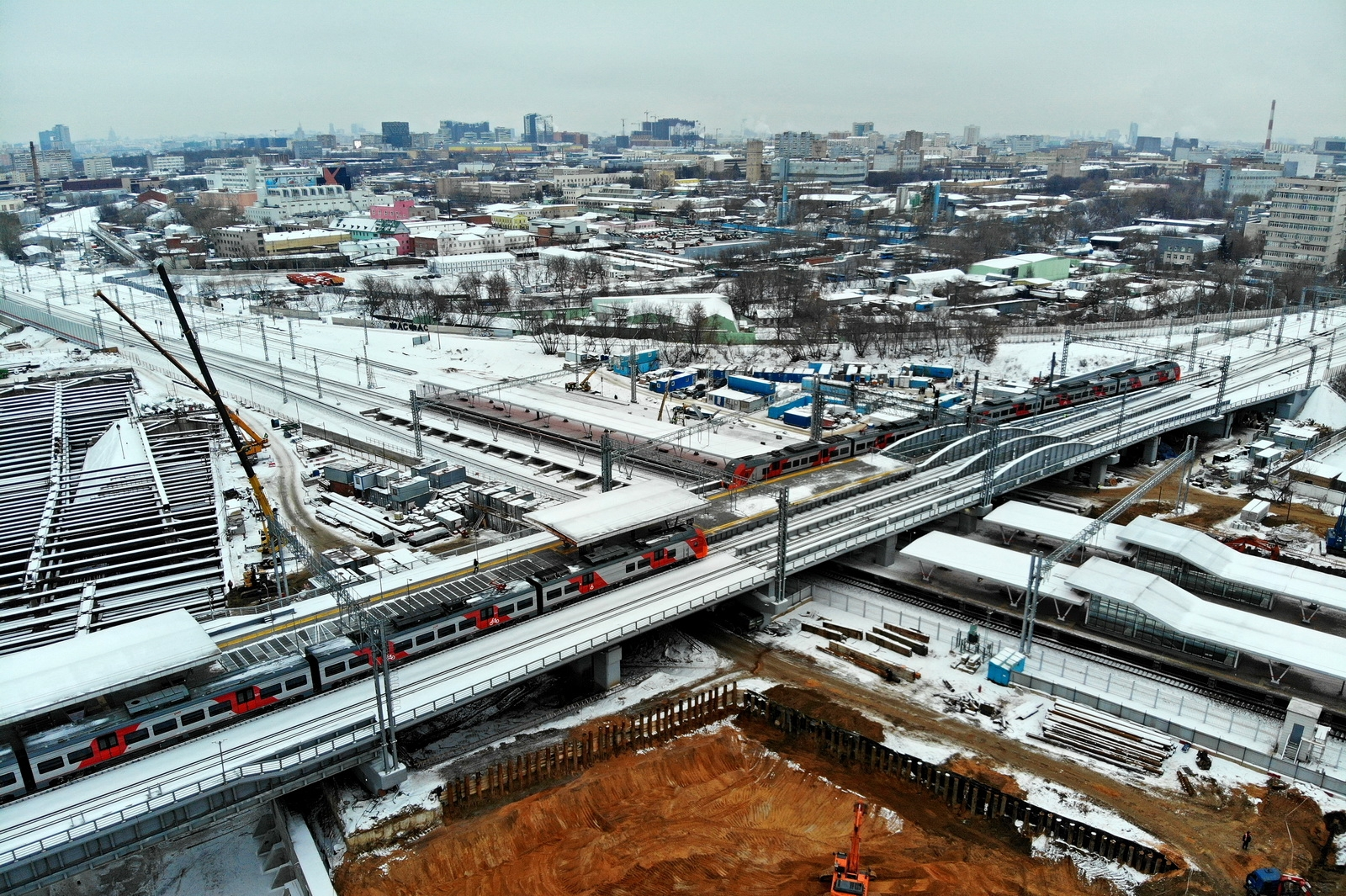 Строительство станции метро «Нижегородская» Некрасовской линии (декабрь 2018)